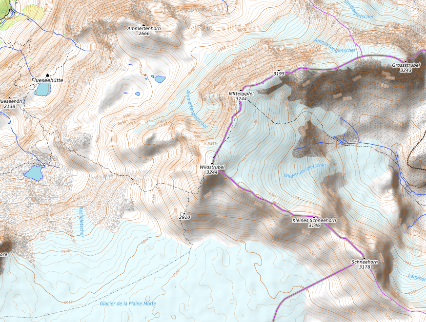 carte réalisée sur umap This map may be incomplete, and may contain errors. Don't rely solely on it for navigation.